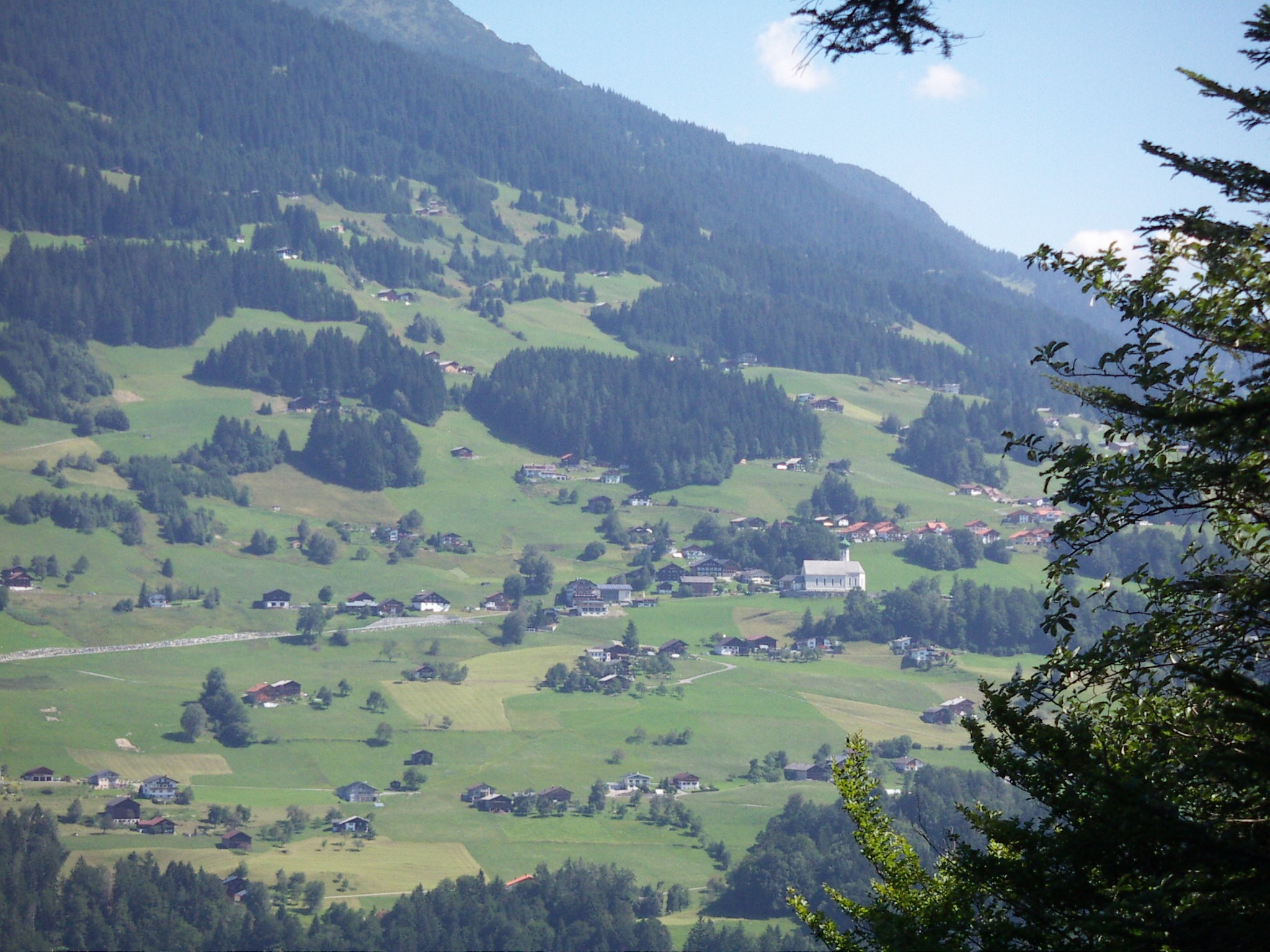 Bartholomäberg, Vorarlberg, Österreich